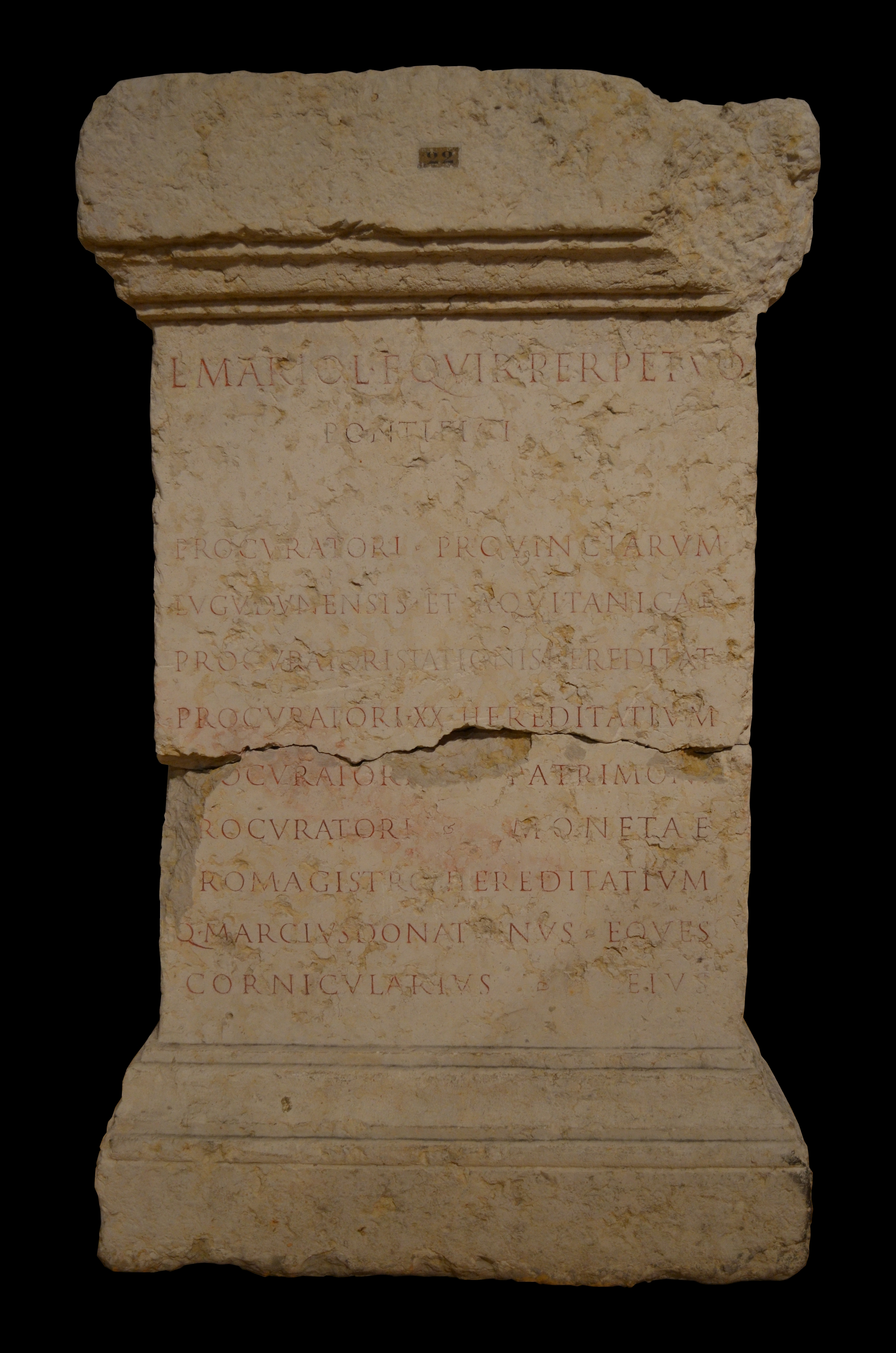 Musée gallo-romain de Fourvière (Lyon) - Piédestal avec base et couronnement découvert en 1768 dans les fondations de la nouvelle Manécanterie, à proximité de la primatiale Saint-Jean-Baptiste-et-Saint-Étienne de Lyon. Haut. 158cm ; larg. 80cm. L(ucio) Mario L(ucii) f(ilio) Quir(ina) Perpetuo / pontifici / procuratori provinciarum / Lugudunensis et Aquitanicae / procuratori stationis hereditat(ium) / procuRatori XX hereditatium / procuratori patrimoni(i) / procuratori monetae / promagistro hereditatium / Q(uintus) Marcius Donatianus eques / cornicularius eius. : A Lucius Marius Perpetuus, fils de Lucius, de la tribu Quirina, pontife, procurateur des provinces de Lyonnaise et d'Aquitaine, procurateur du bureau des successions, procurateur de l'impôt du vingtième des successions, procurateur du patrimoine, procurateur de la monnaie, promagister des successions, Quintus Marcius Donatianus cavalier, corniculaire attaché au service de ses bureaux.